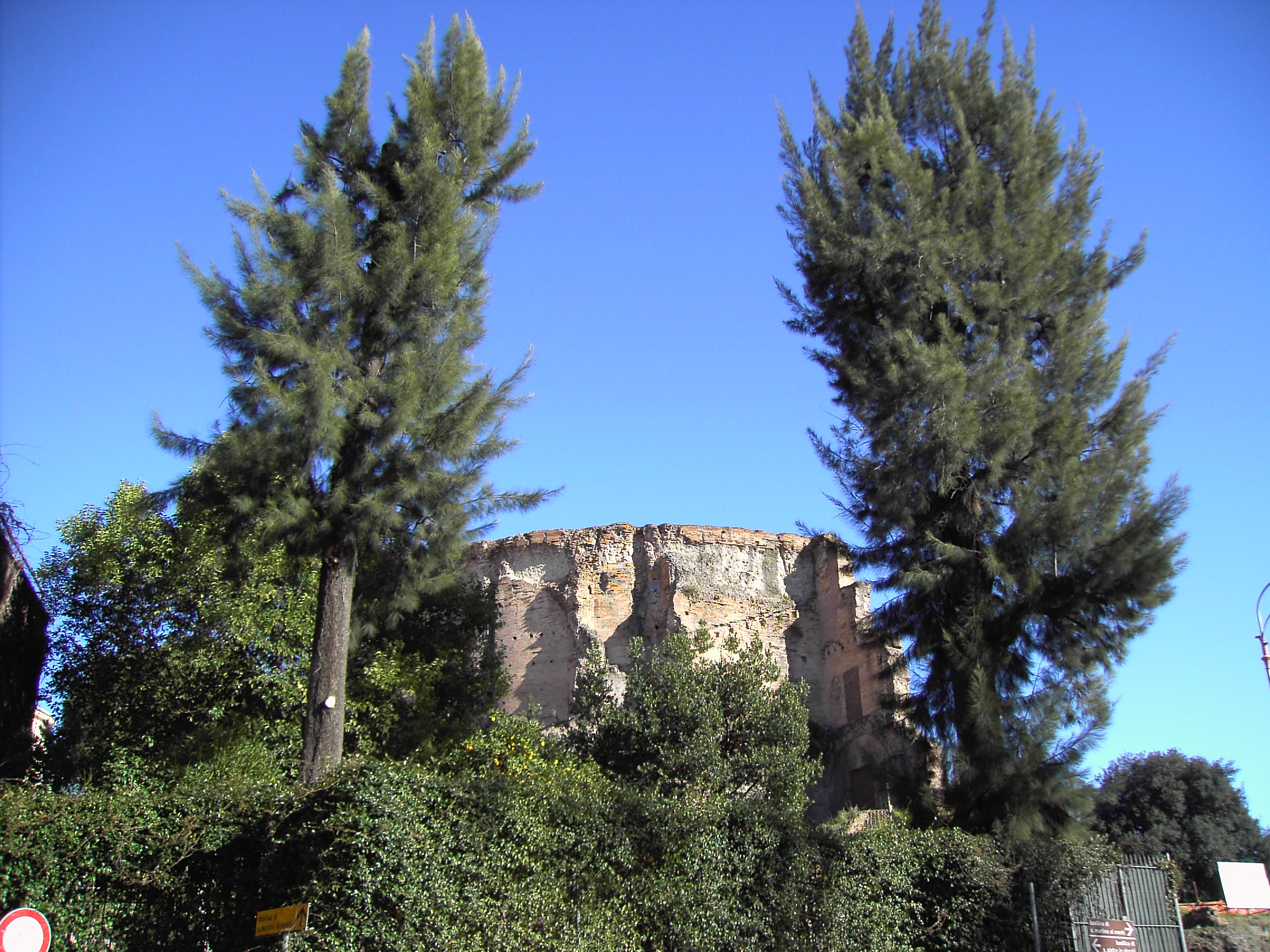 Roma, colle Oppio: resti delle Terme di Tito.